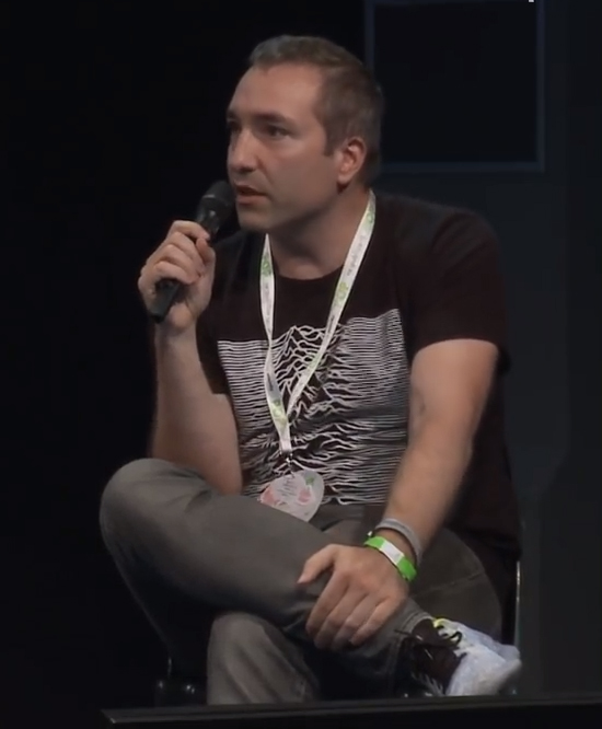 Prof. Hegelich (*1976) verbindet in seiner Forschung Politikwissenschaft und Computerwissenschaft zu Political Data Science.